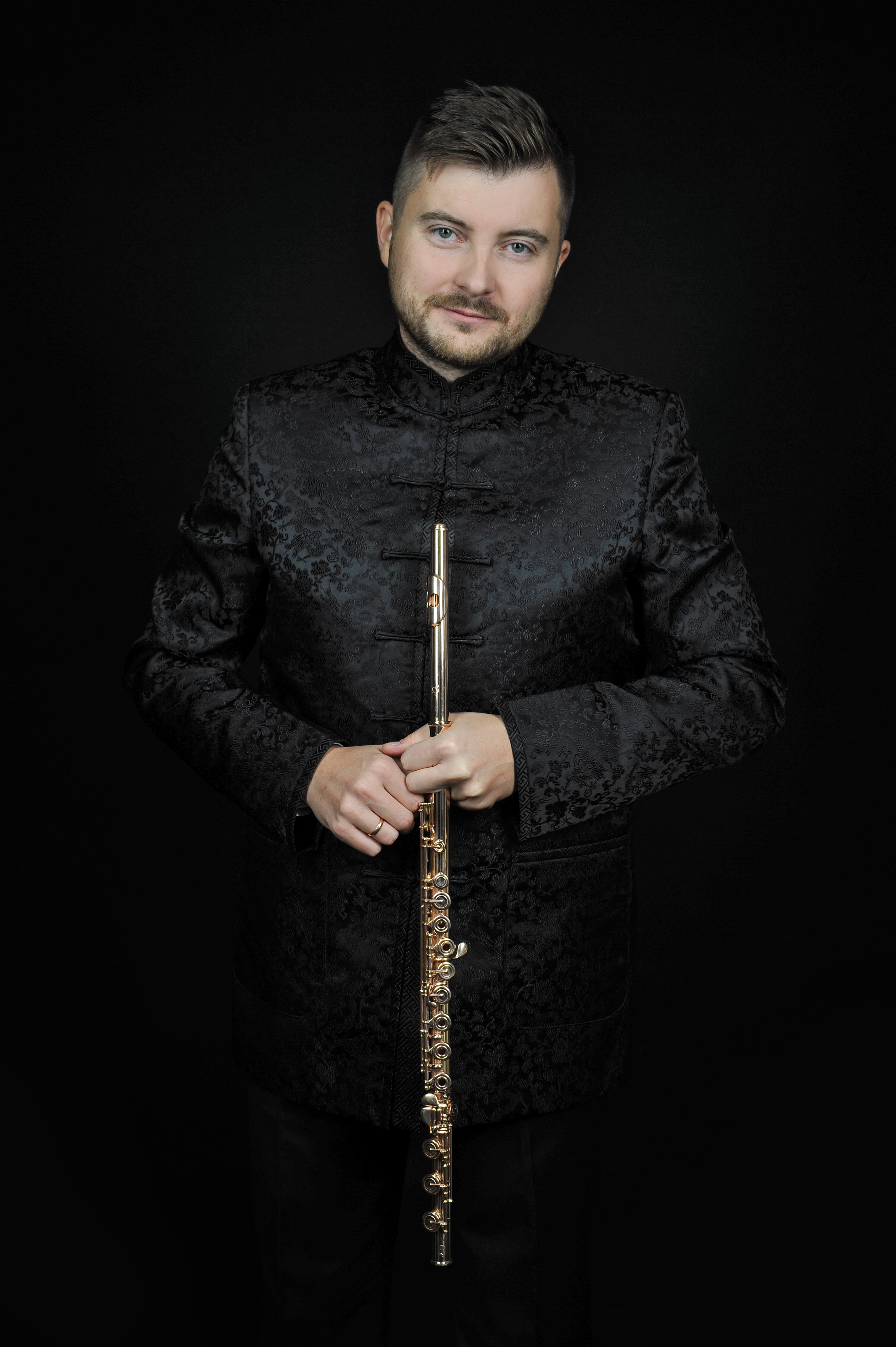 Łukasz Długosz, flecista.